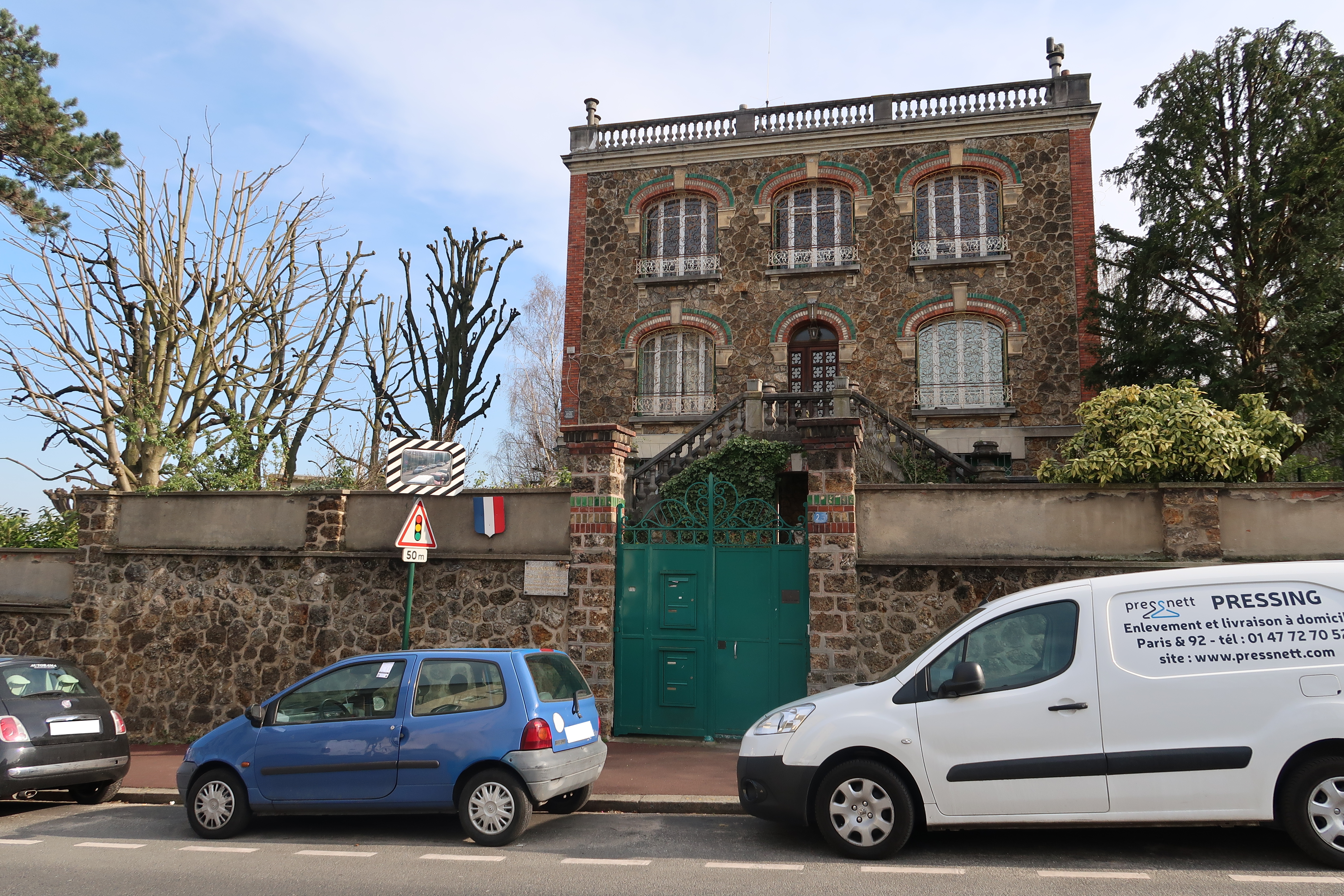 Maison de la résistante Noor Inayat Khan qui habita la maison située 23 rue de la Tuilerie à Suresnes (Hauts-de-Seine).